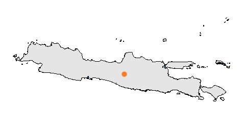 Locator van Surakarta